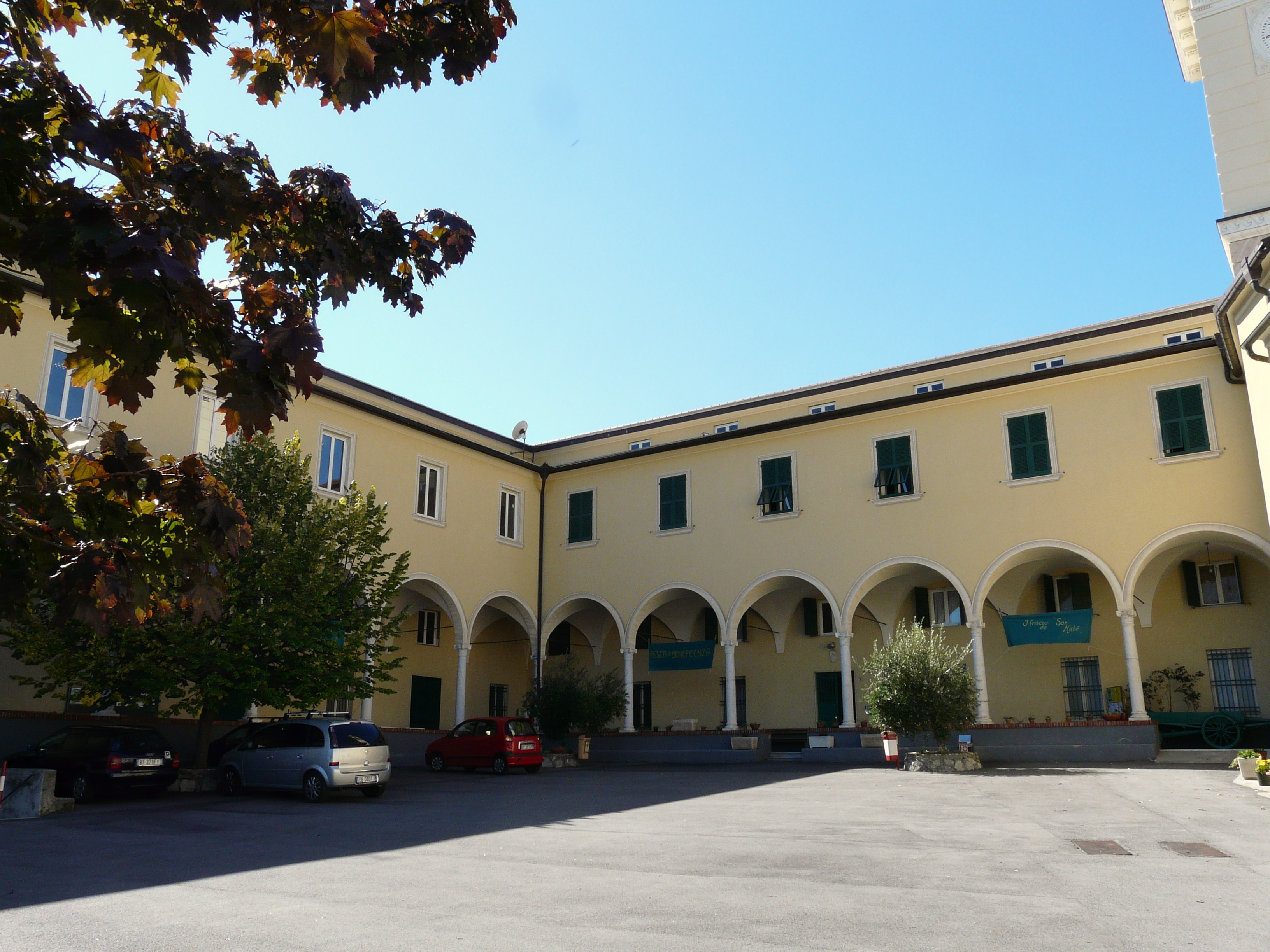 Chiostro del santuario di Nostra Signora Incoronata, Coronata, Genova, Liguria, Italia